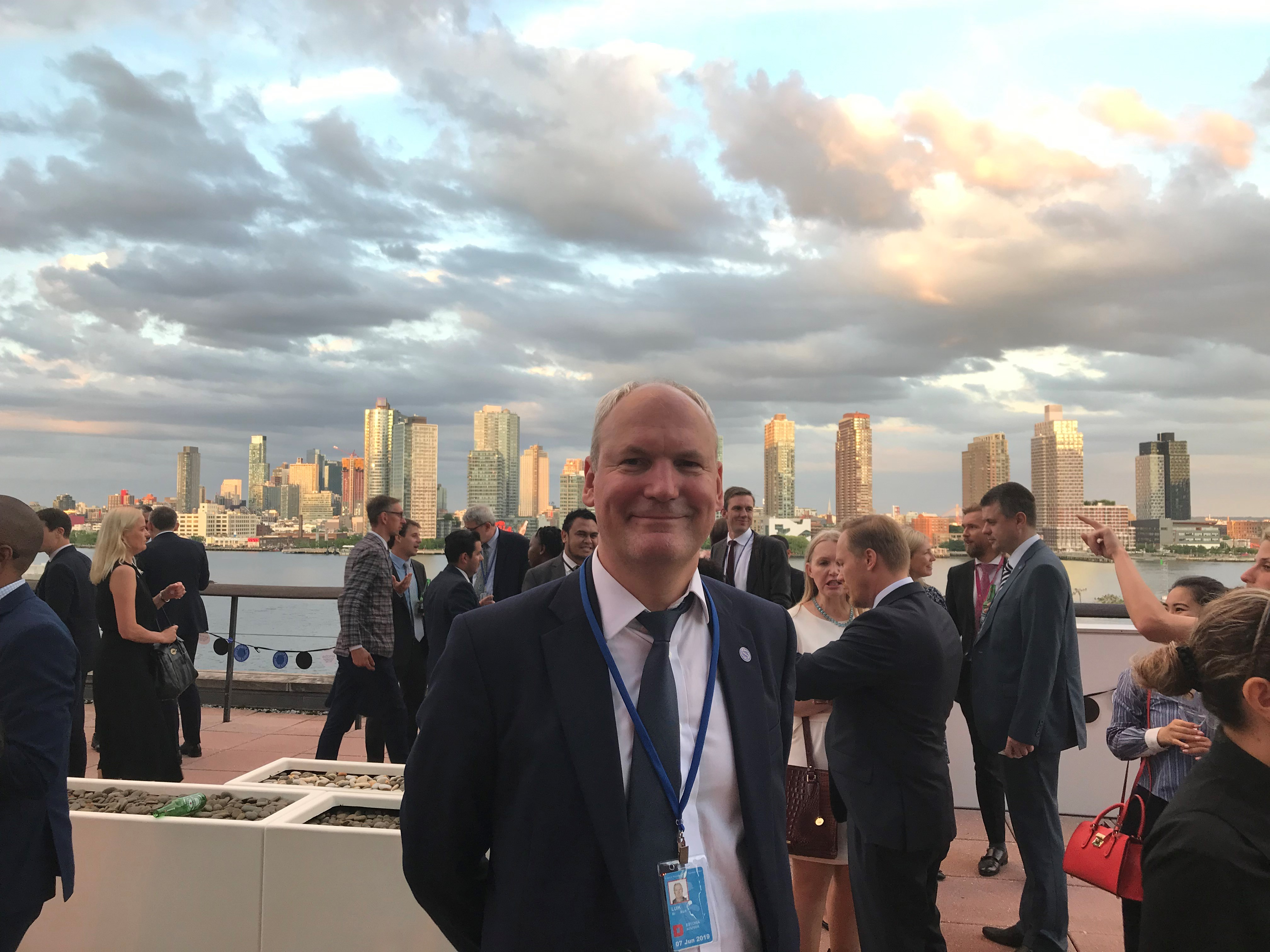 Mart Luik ÜRO-s 2019. aastal